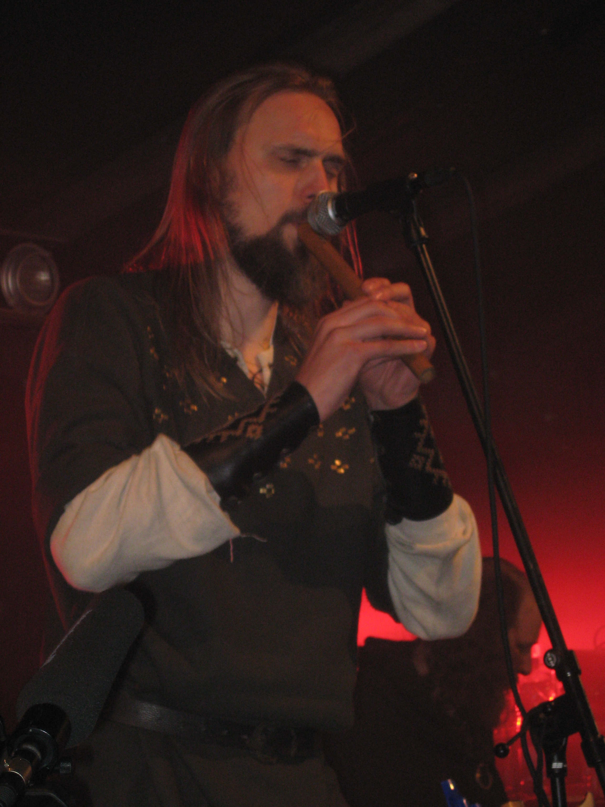 Skyforger playing at Zvērā Festival 2009 (Latvia).